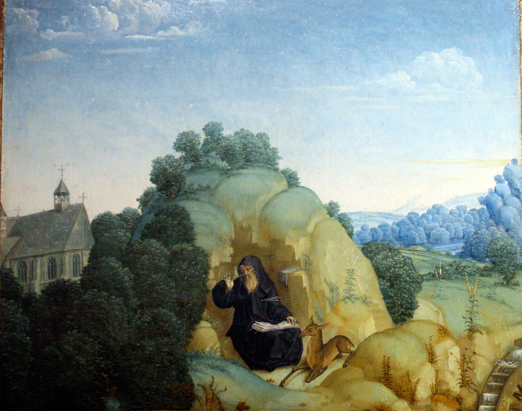 Thomasaltar um 1495-1500, Maler: „Meister des Bartholomäusaltars“. Triptychon im Wallraf-Richartz-Museum Köln. Der Ausschnitt zeigt eine Darstellung der Kölner Kartause